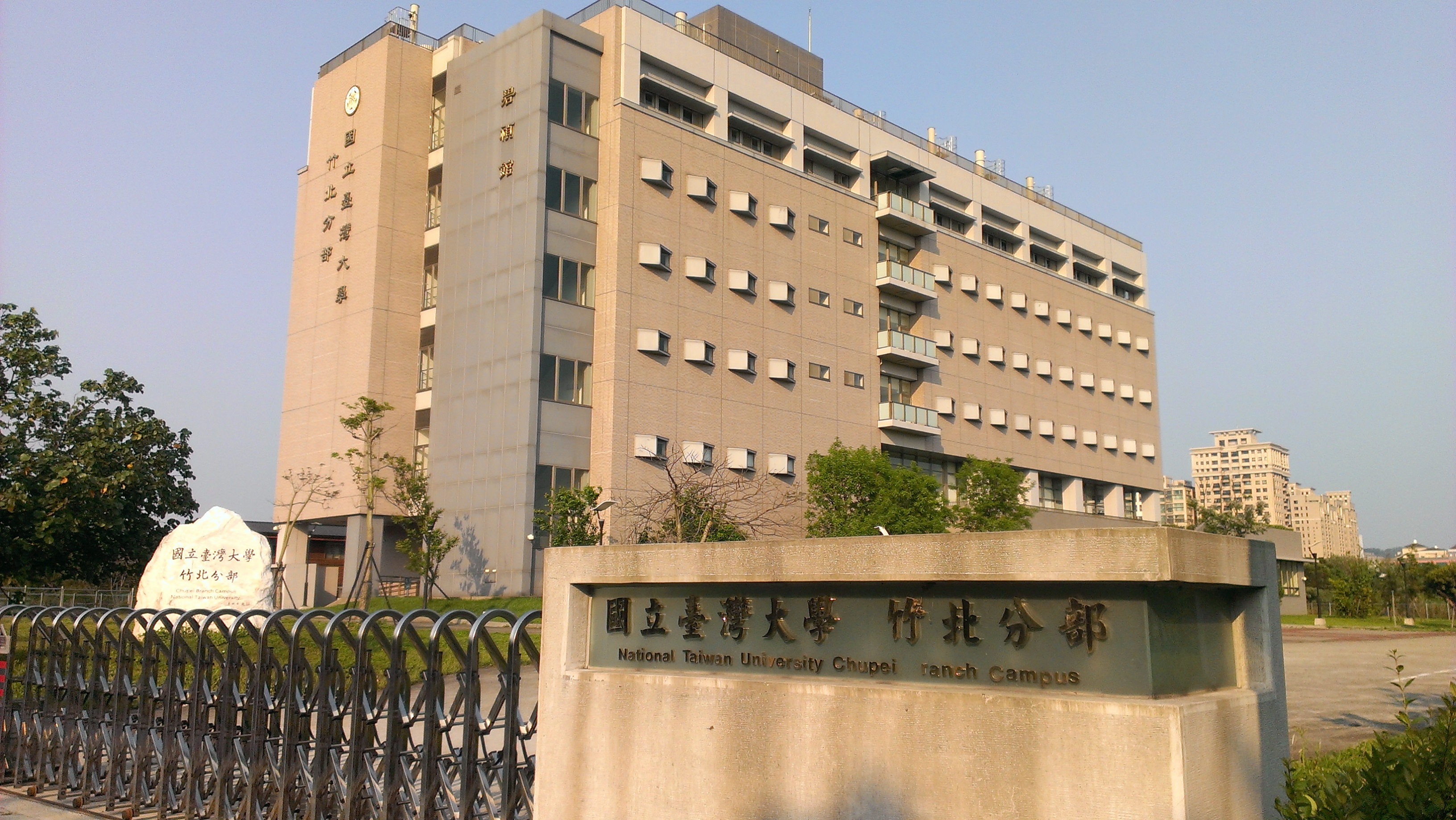 國立台灣大學竹北分部